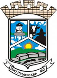 Bandeira do município de Rio Piracicaba, em Minas Gerais, Brasil.